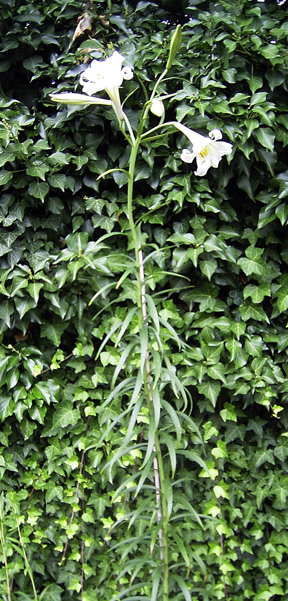 Lilium phillipinense